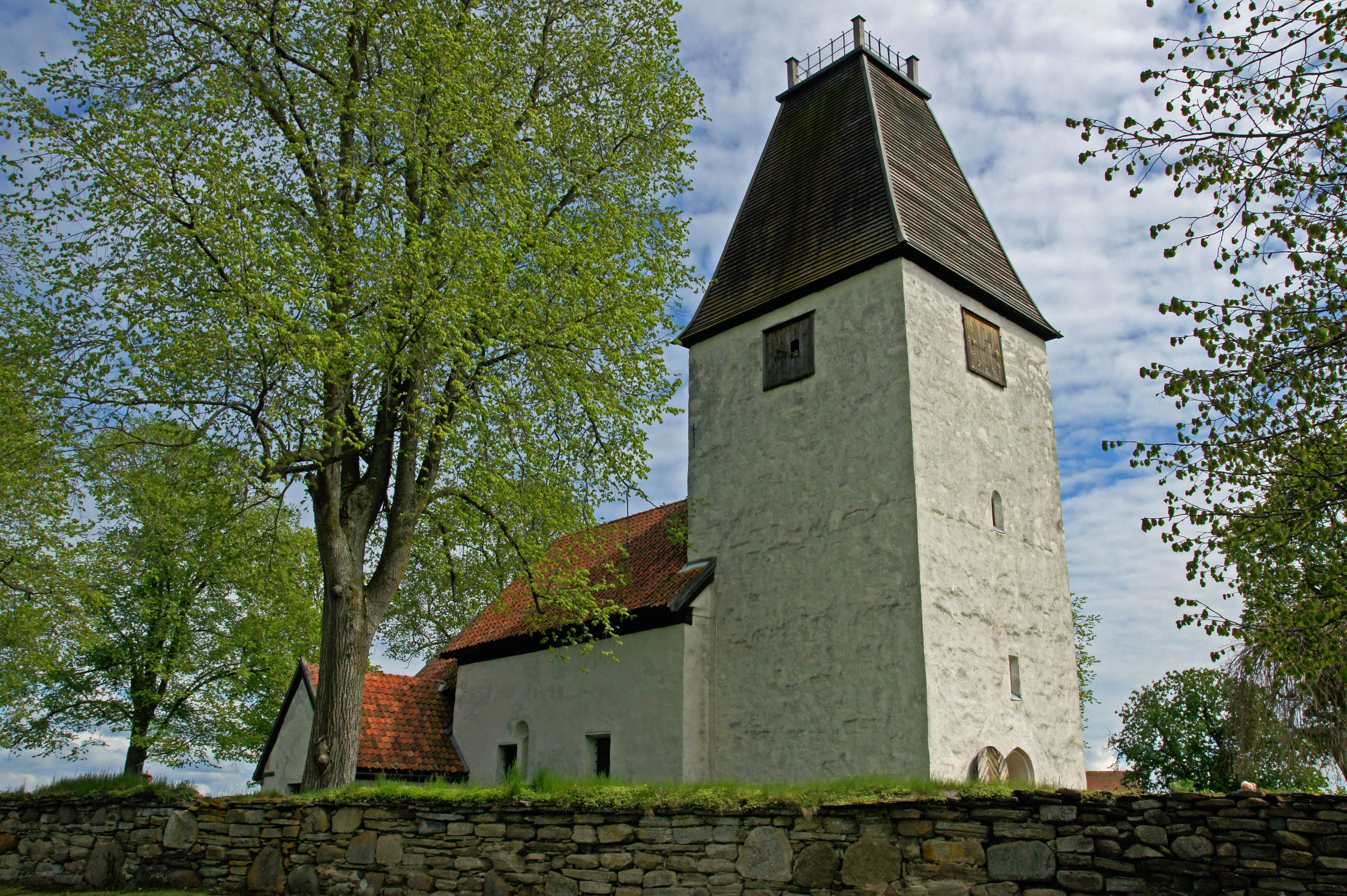 2010-05-22 06-05 Schweden 0351 Visingsö, Kumlaby Kyrka